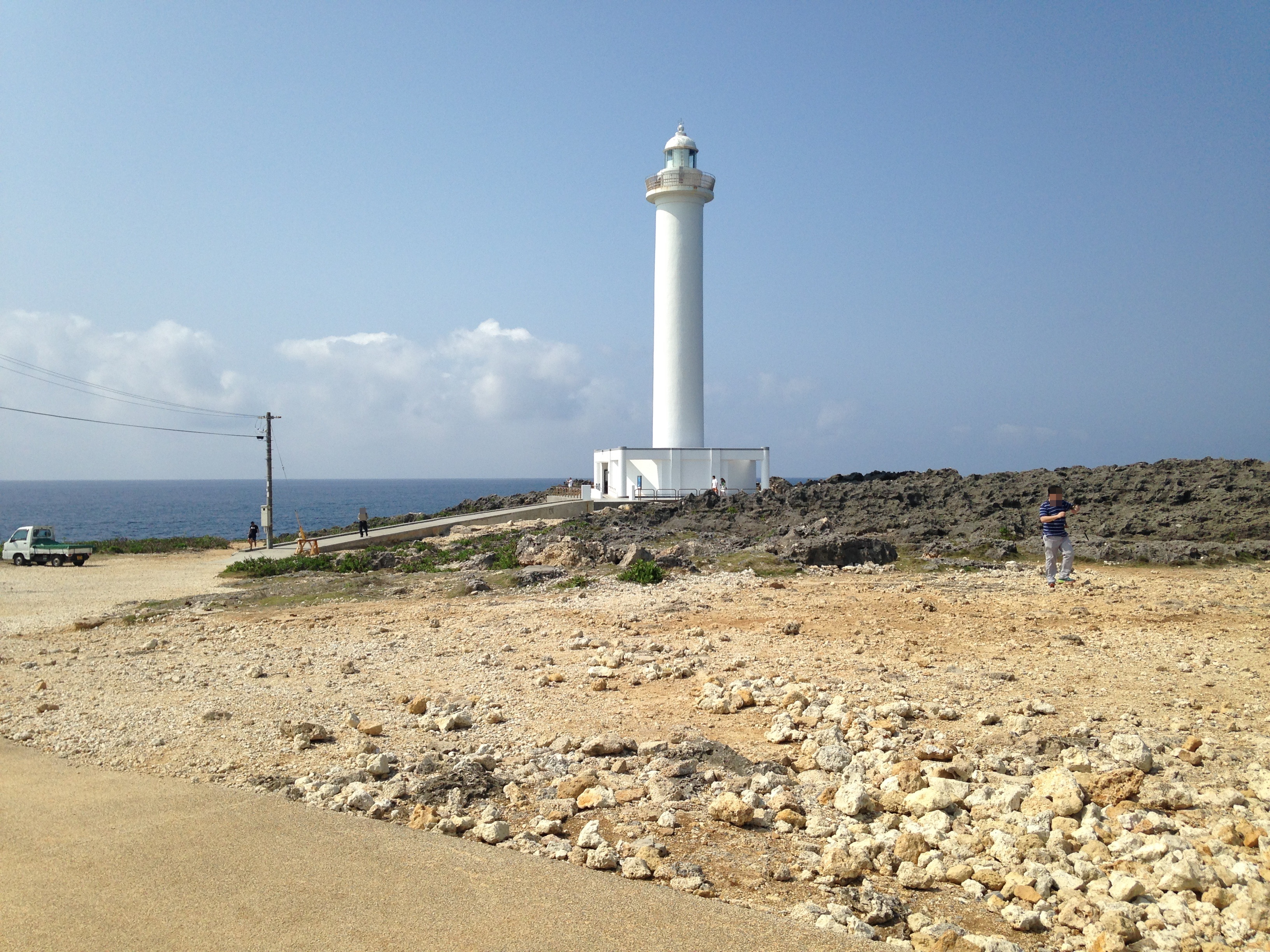 残波岬にある残波岬灯台と岩場